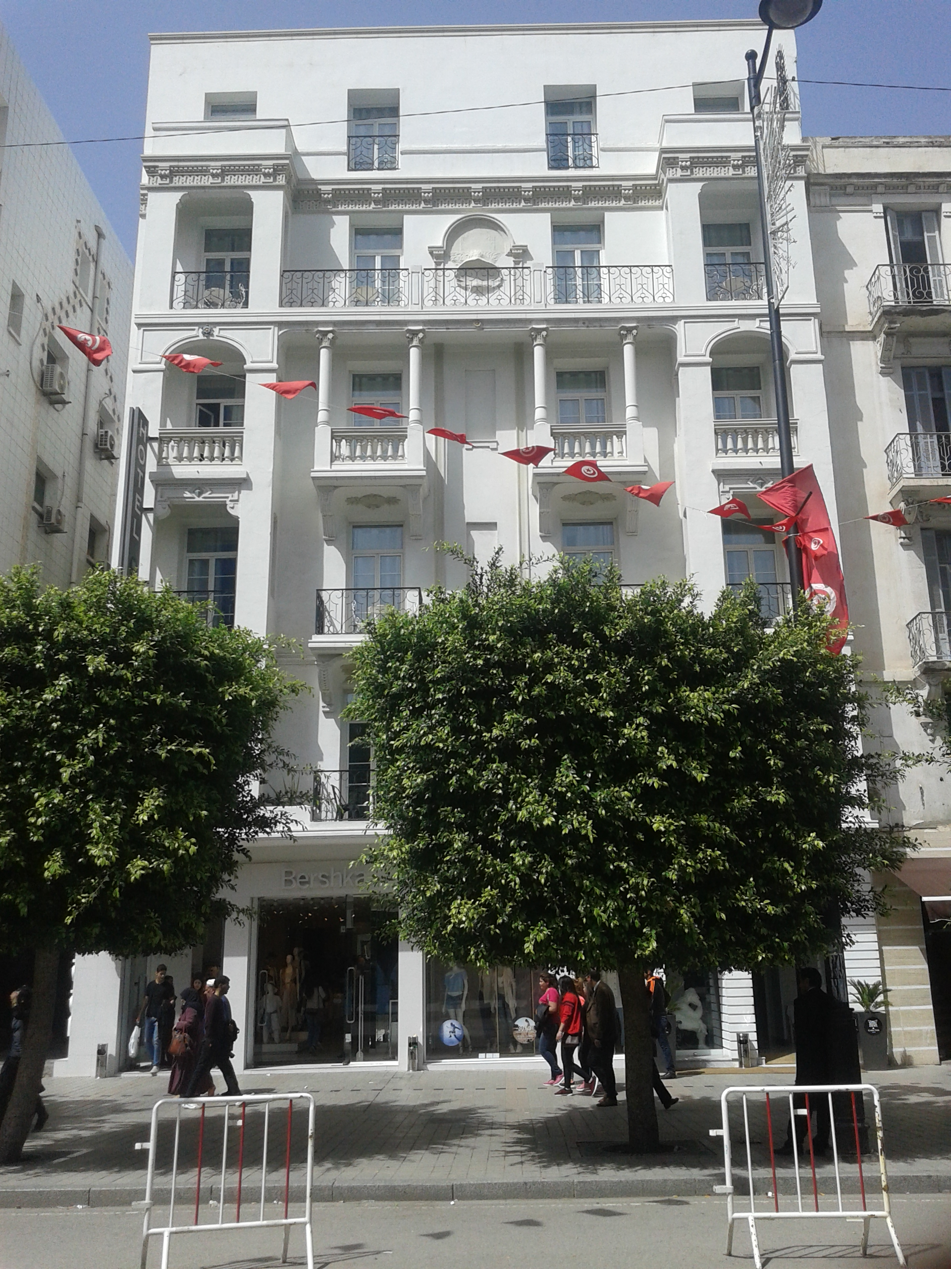 Hotel carlton (avenue habib bourguiba)